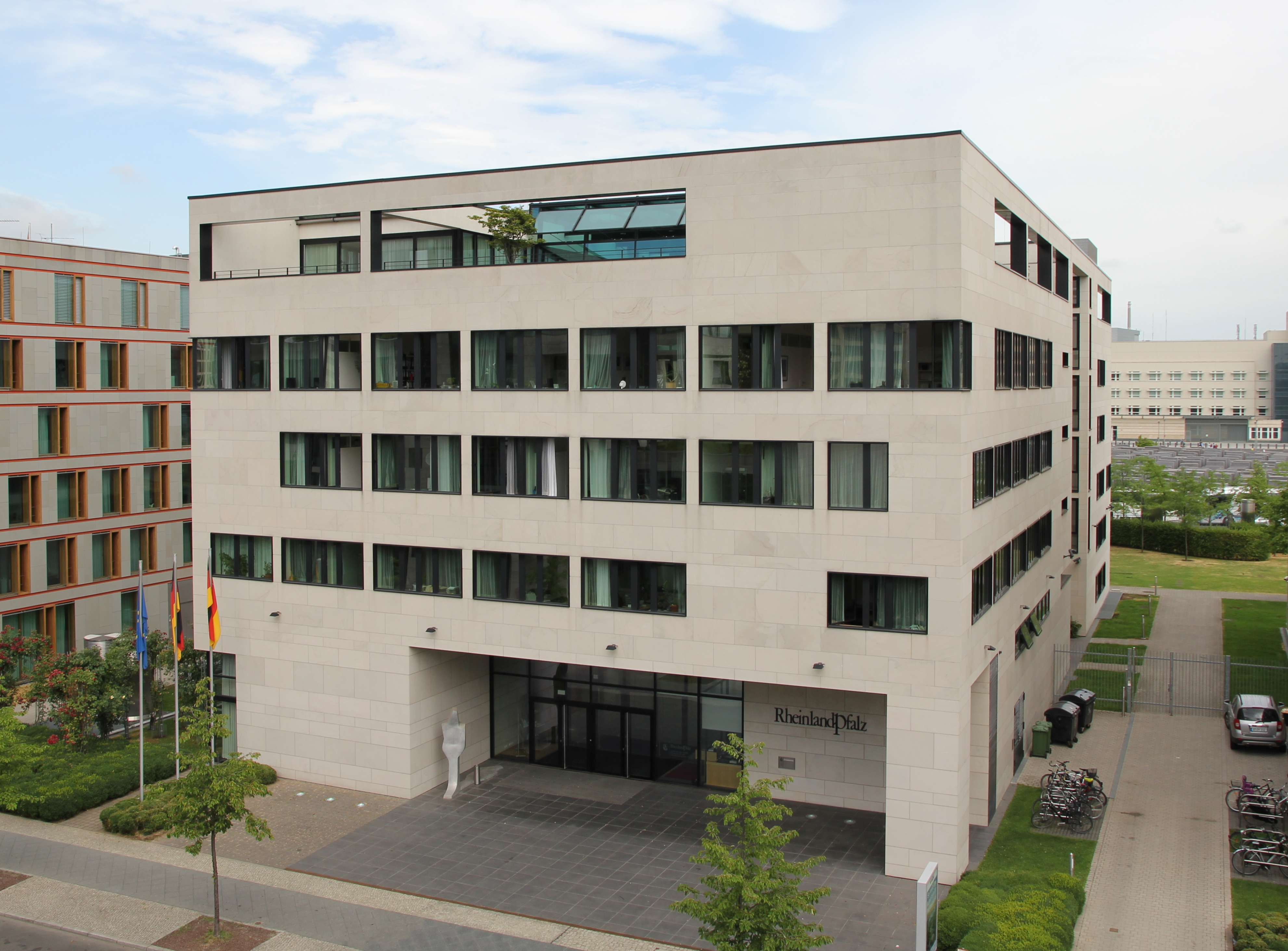 Südseite der Landesvertretung Rheinland-Pfalz, In den Ministergärten 6, 10117 Berlin